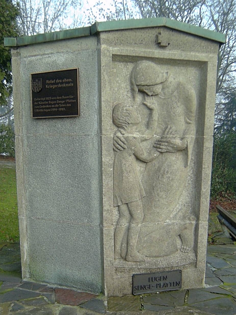 Kriegerdenkmal in Schmallenberg, Germany, (zum Gedenken an die Toten des 1. Weltkriegs, gefertigt von dem Künstler Eugen-Senge-Platten, 1923)